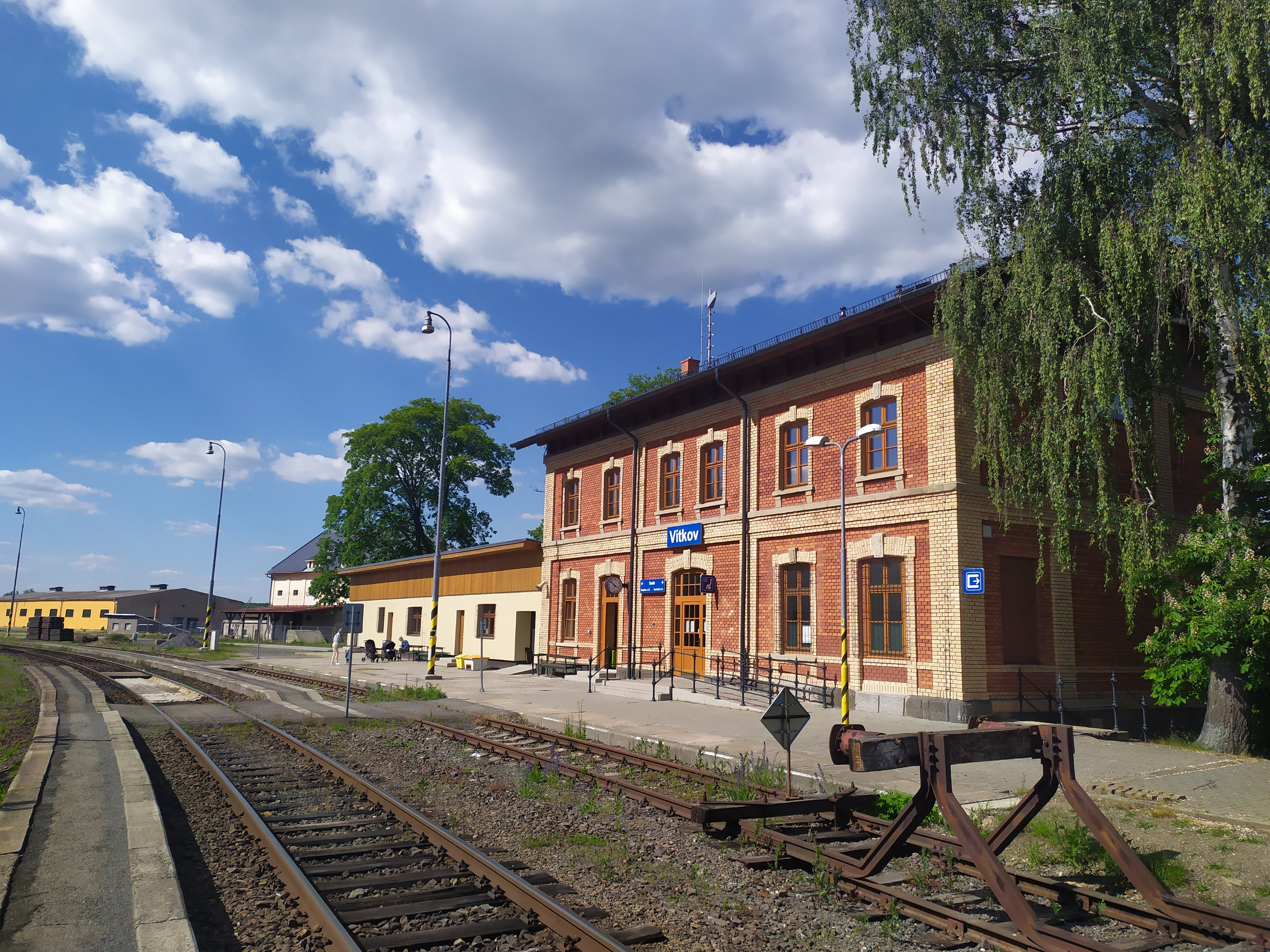 Vlakové nádraží ve Vítkově